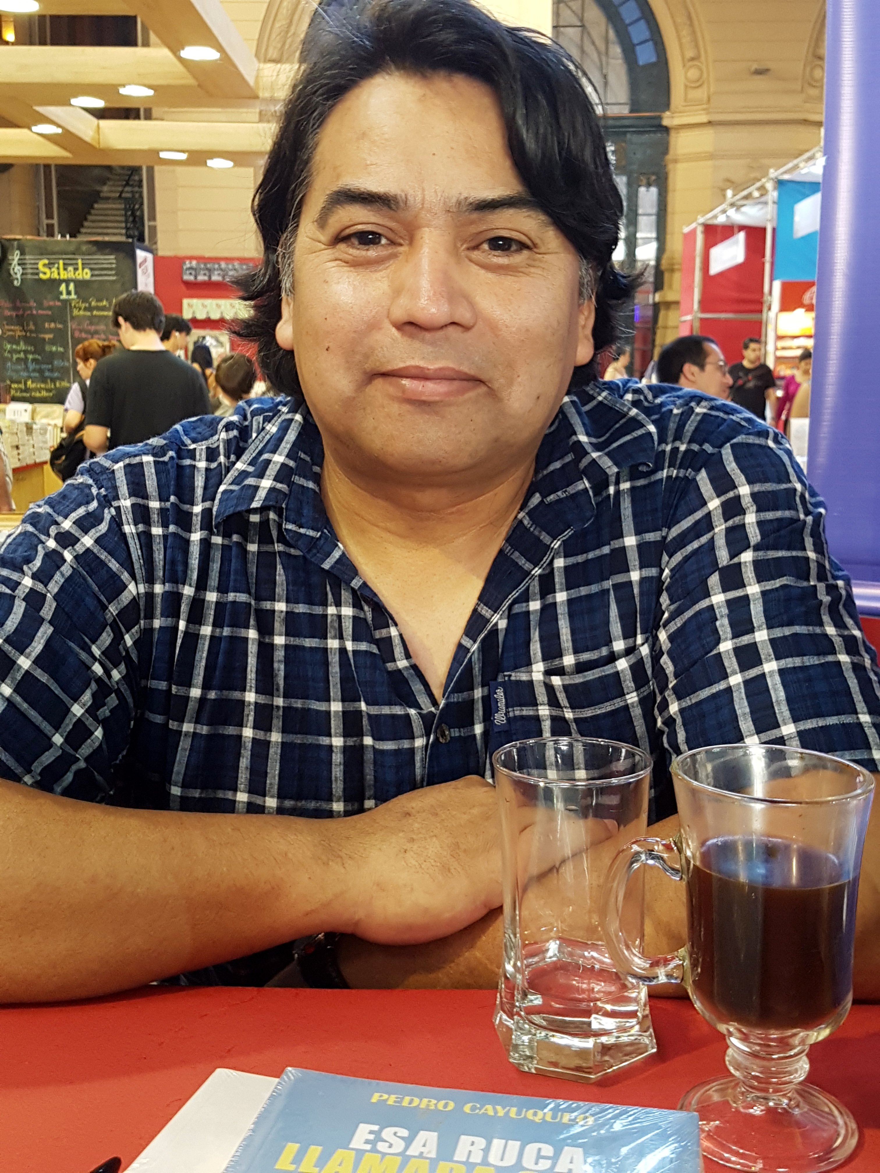 El periodista chileno y activista mapuche Pedro Cayuqueo en la Feria Internacional del Libro de Santiago 2017